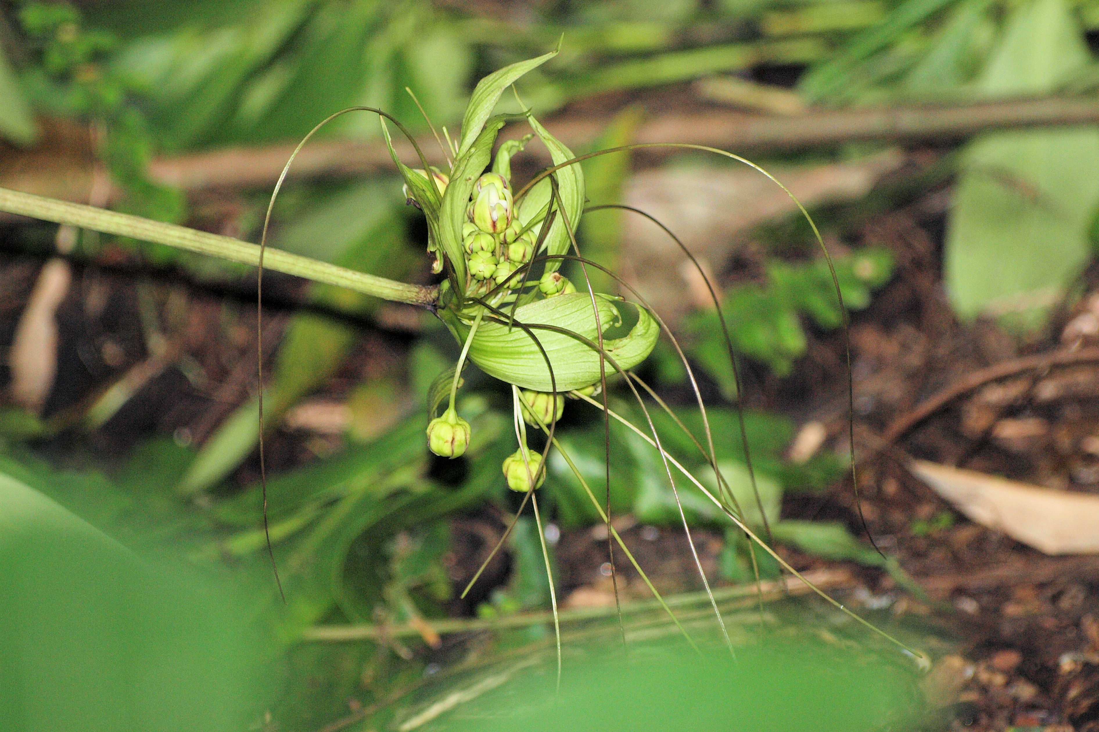 Die Blüte einer Madagaskar-Fledermausblume (Tacca ankaranensis). Der tragende Stängel ist abgeknickt. Aufgenommen in der Masoala-Halle des Zoo Zürich.